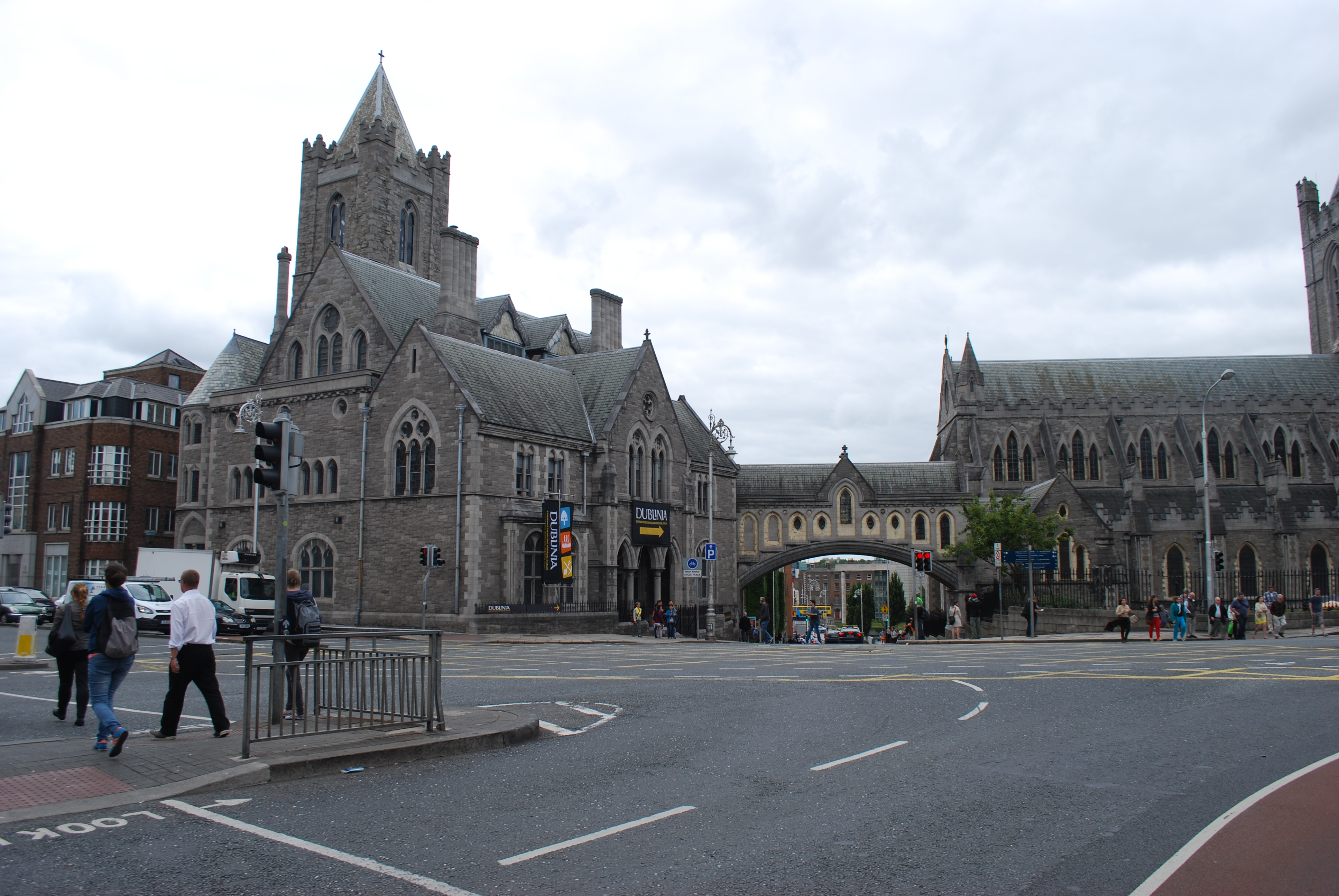 Vue de Christ Church Cathedral, à Dublin.